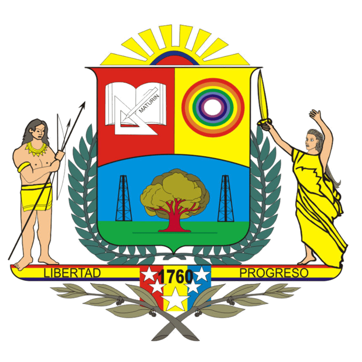 Escudo municipio Maturín del Estado Monagas. Creado por Jhon Elías Aguirre Blanco